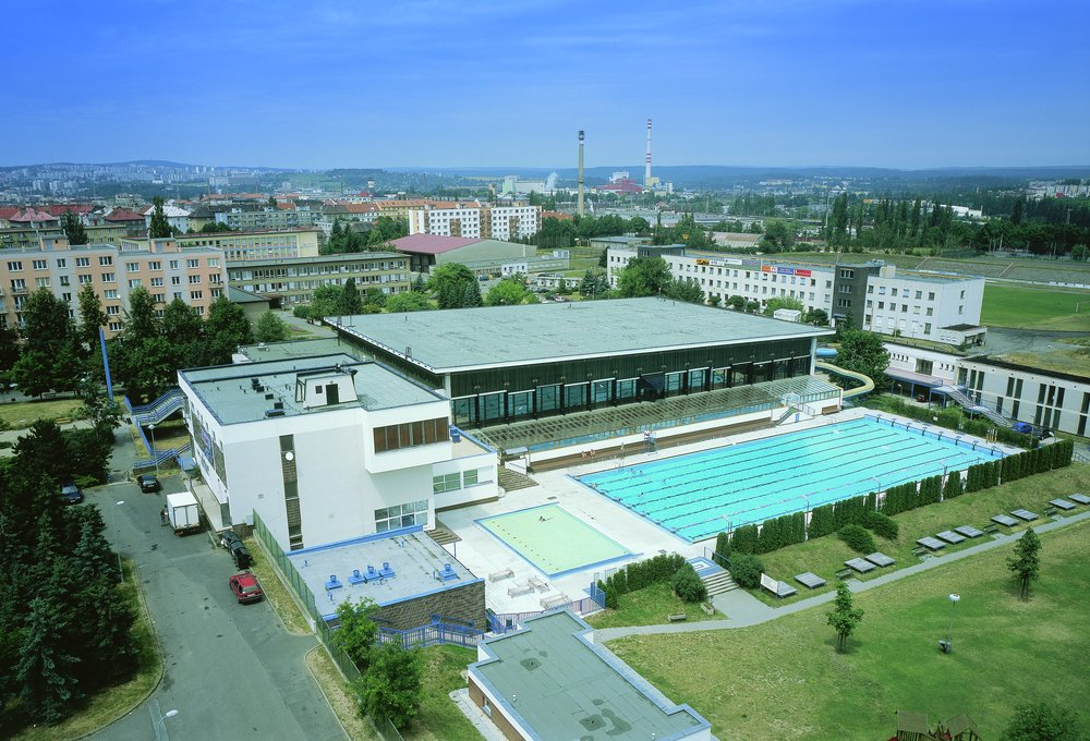 Plzeň, bazén Slovany.